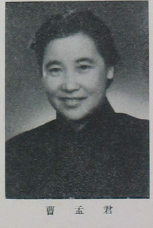 中文（台灣）: 中國人民政治協商會議第一屆全體會議代表